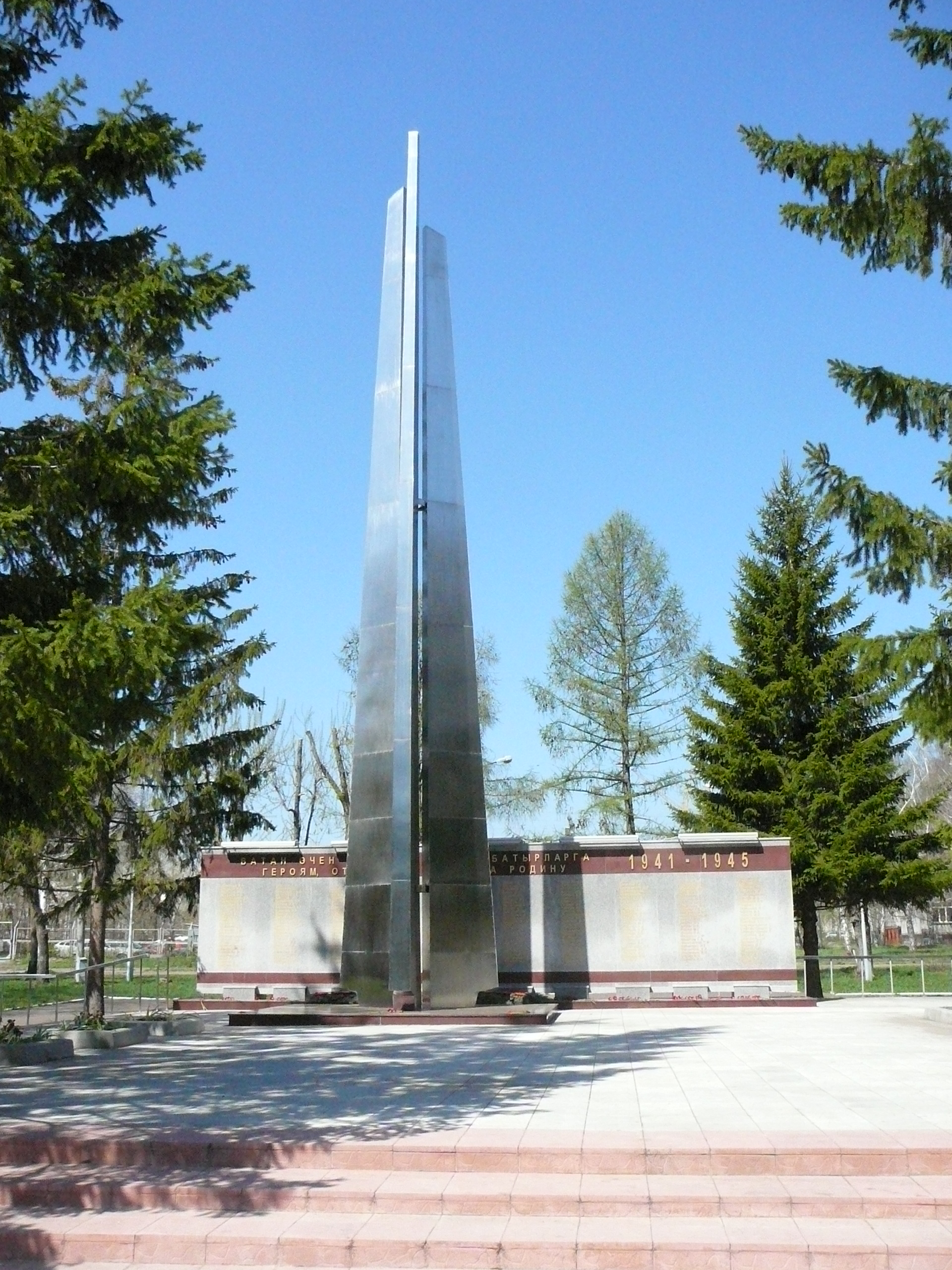 Мемориал в честь работников КАПО им. С. П. Горбунова (г. Казань), погибших во время Великой Отечественной войны (расположен в сквере напротив проходной предприятия)